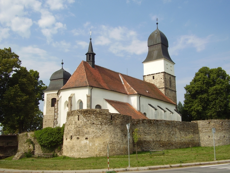 Kostel svatého Jana Křtitele ve Velké Bíteši, okres Žďár nad Sázavou